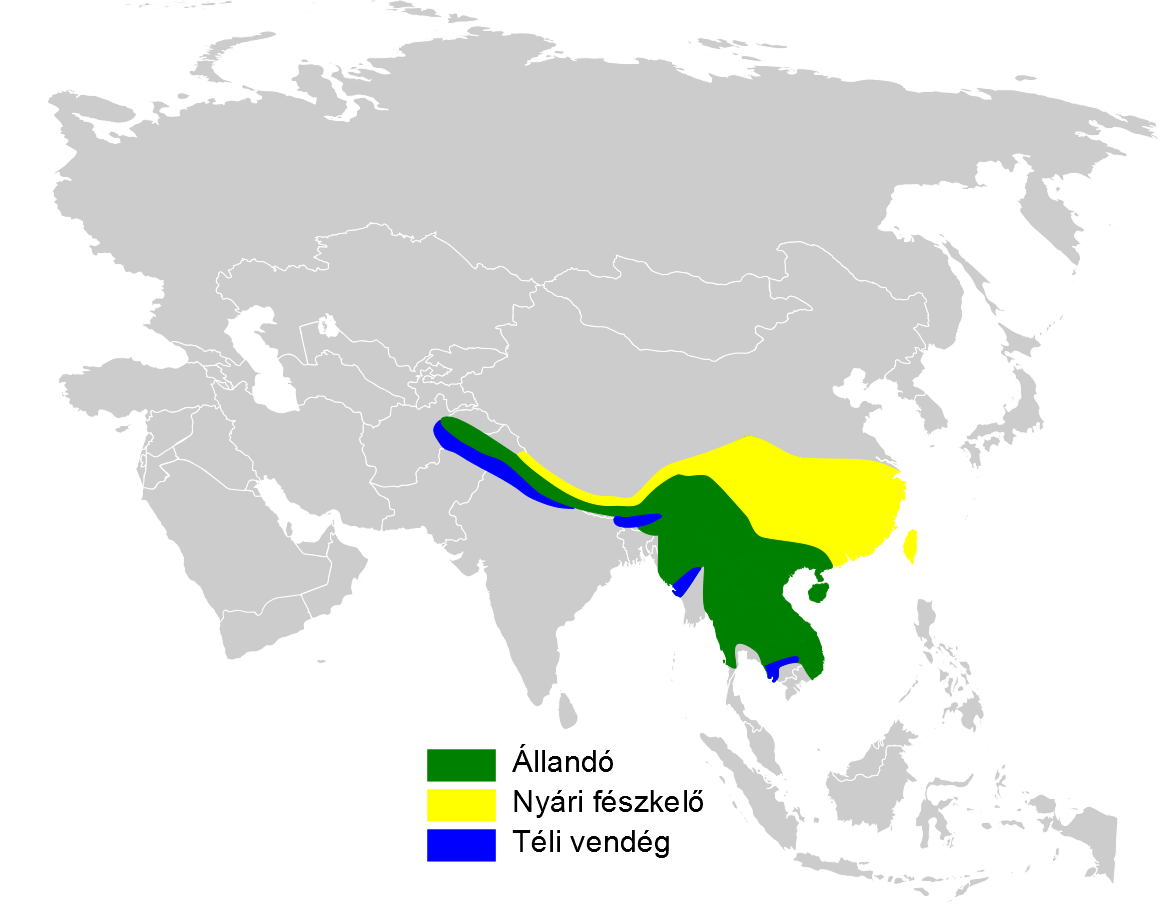 Hypsipetes leucocephalus distribution map